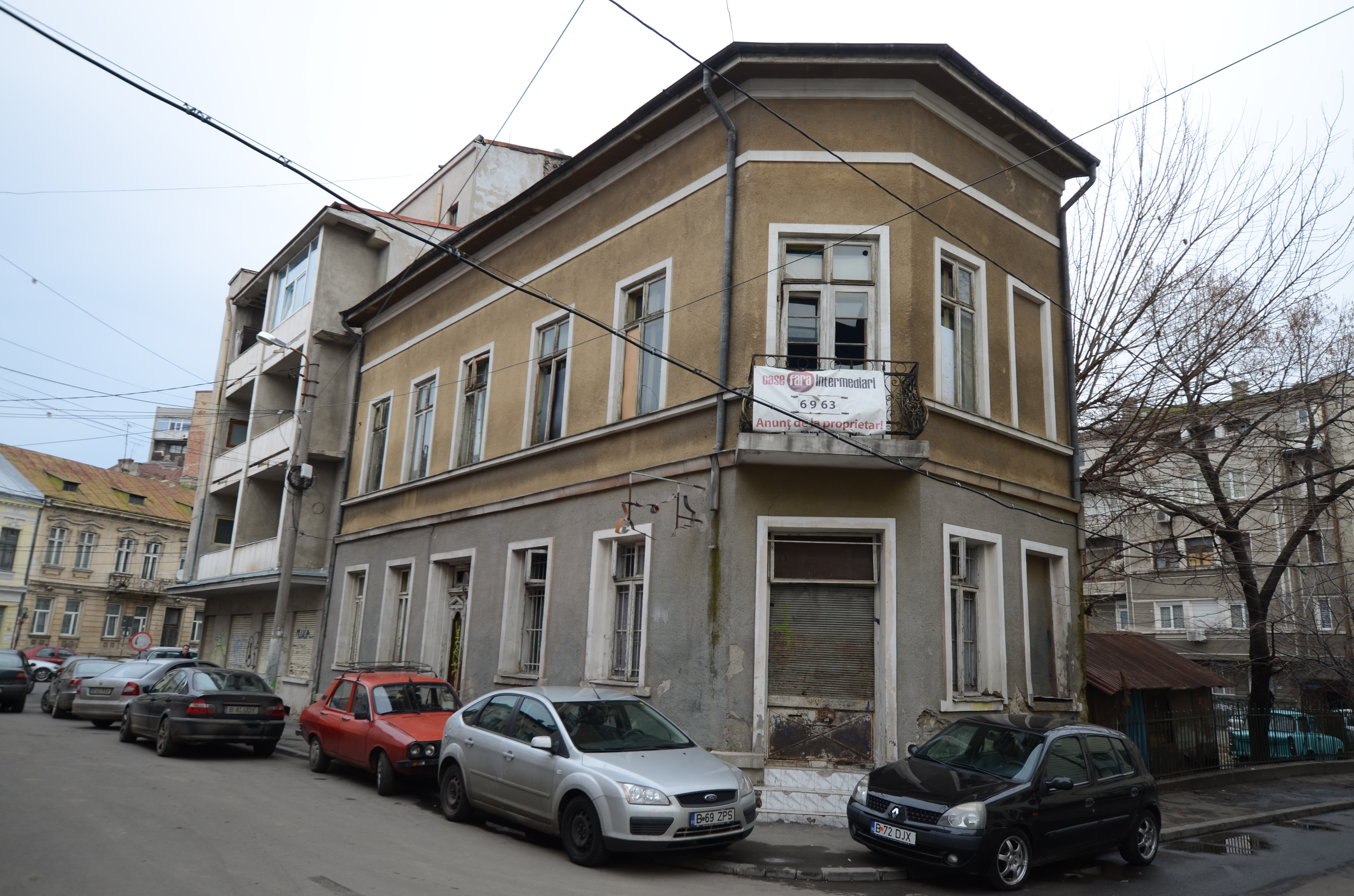 Casă, Str. Sarmizegetusa nr. 3, București